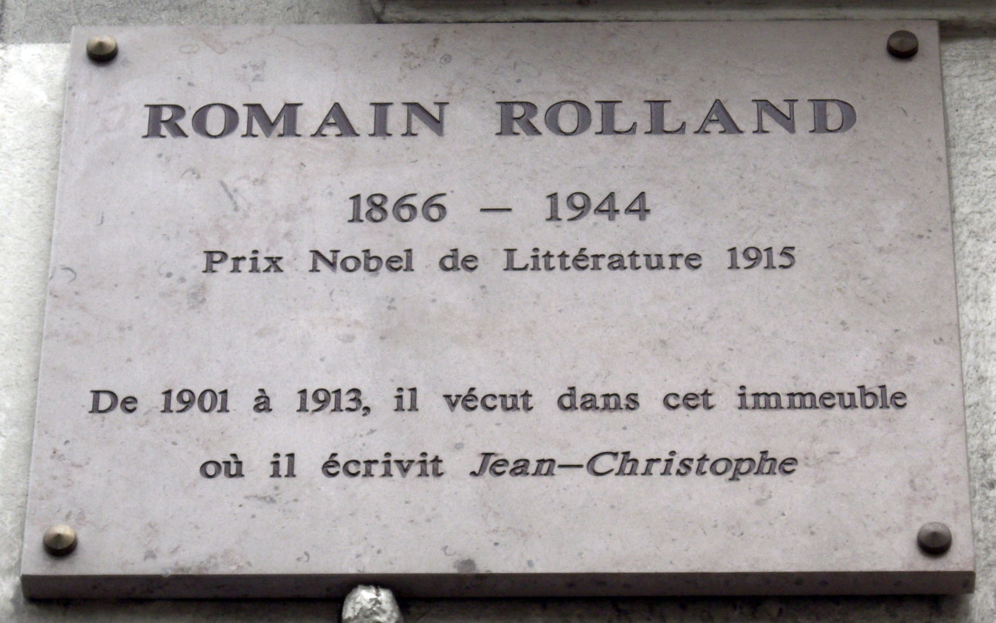 Plaque apposée au n° 162 du boulevard du Montparnasse, Paris 14e, où vécut Romain Rolland (1866-1944) de 1901 à 1913 et où il écrivit Jean-Christophe.